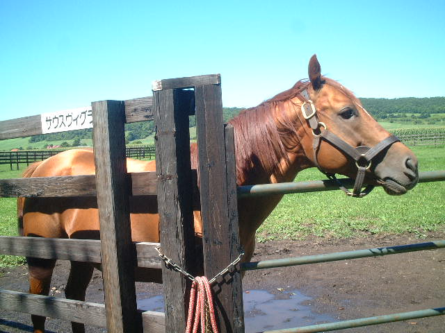 静内スタリオンステーションにて撮影。